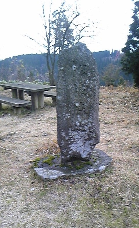 Matsune Castle.Kanazawa, Ishikawa Prefecture, Japan.松根城本丸